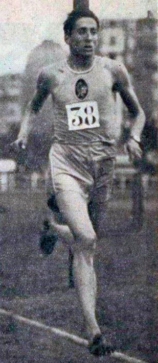 Marcel Hansenne, deux places de deuxième lors de meetings aux USA, au début de l'année 1946.